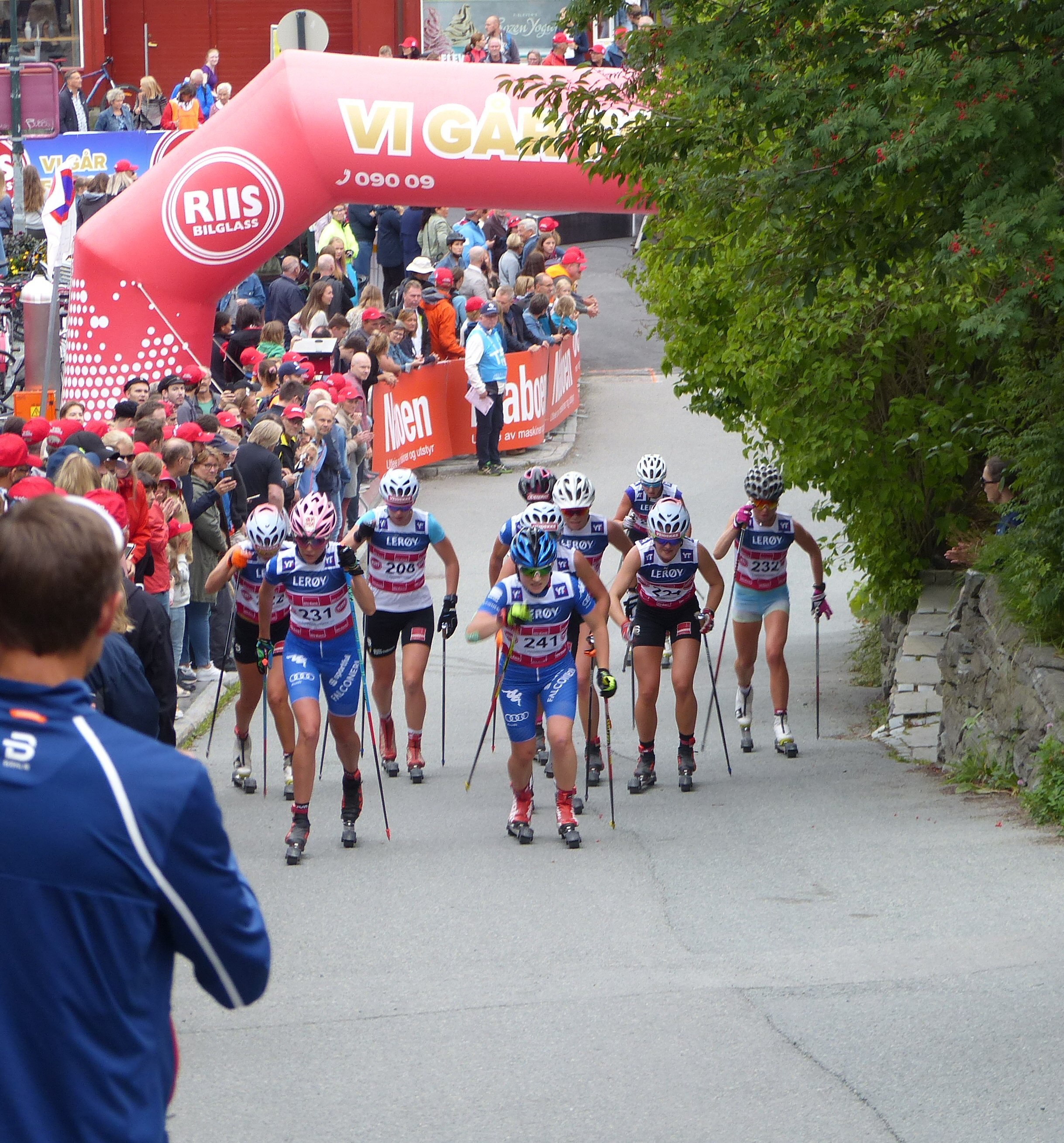 Toppidrettsveka 2019. Hovedfeltet i jaktstarten for kvinner på vei opp Brubakken i Trondheim.